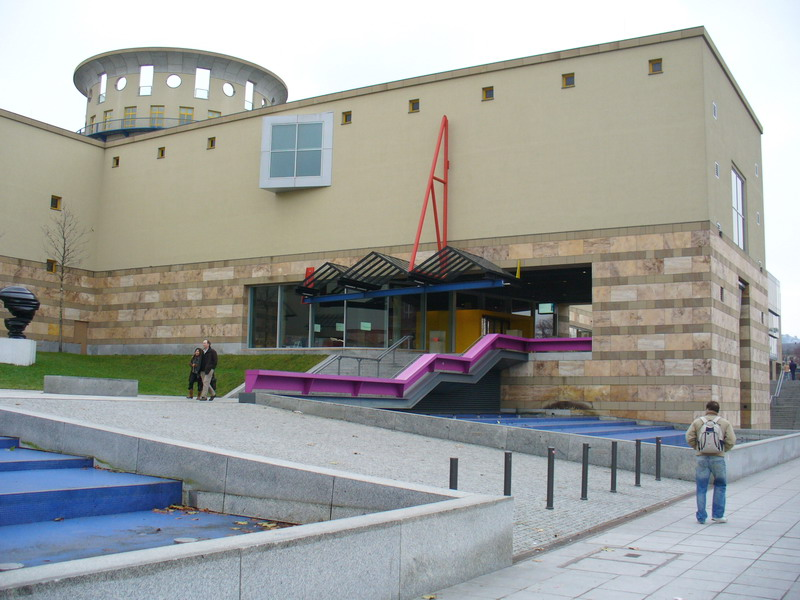 Stuttgart - Haus der Geschichte Baden-Württemberg